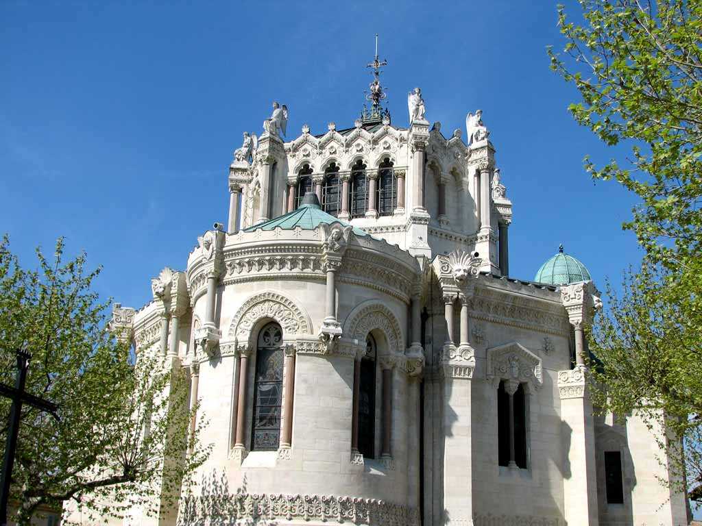 Ars-sur-Formans, Basilique de Saint Jean-Marie Vianney